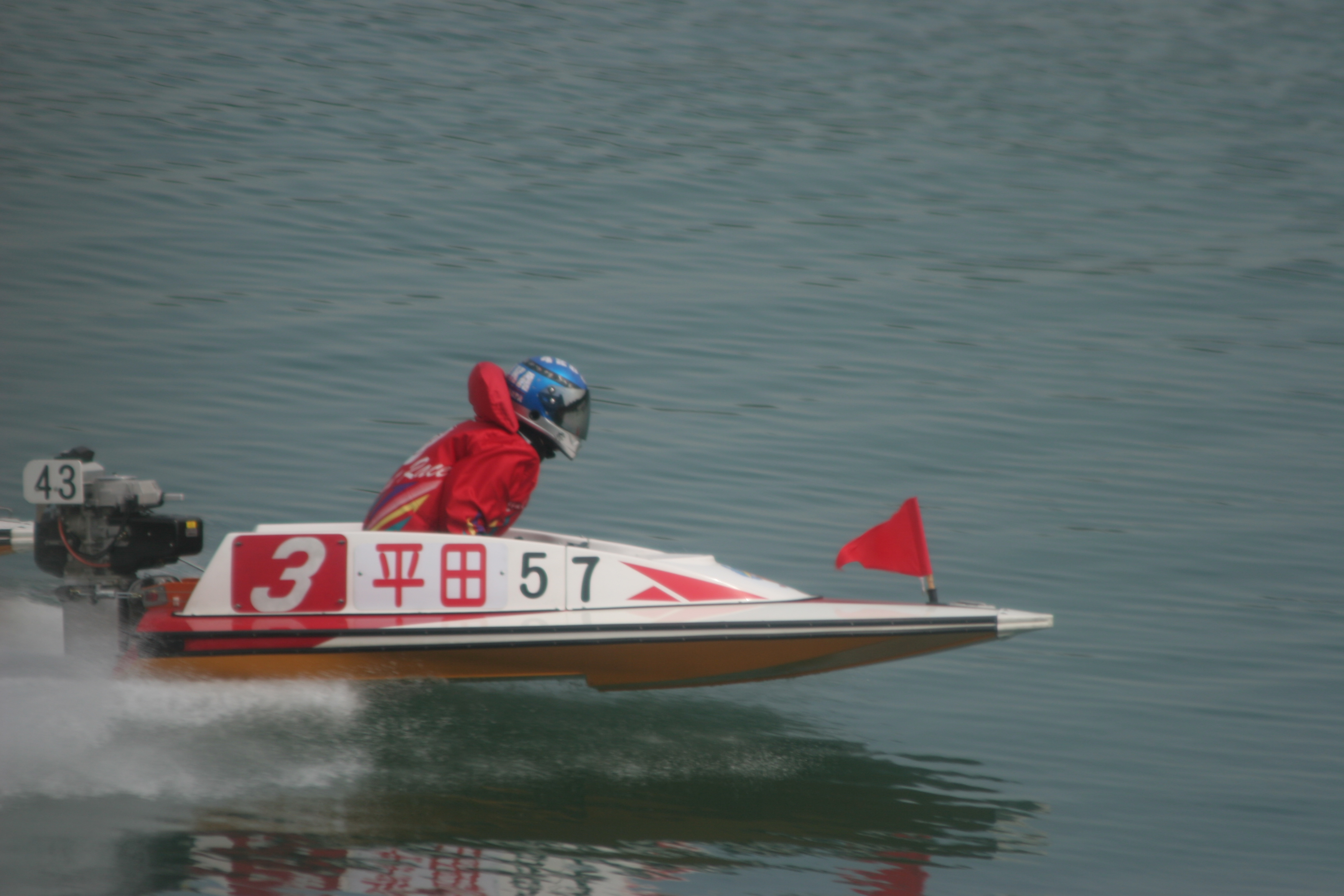 2010年5月9日多摩川競艇場第7レースで航走中の平田さやか